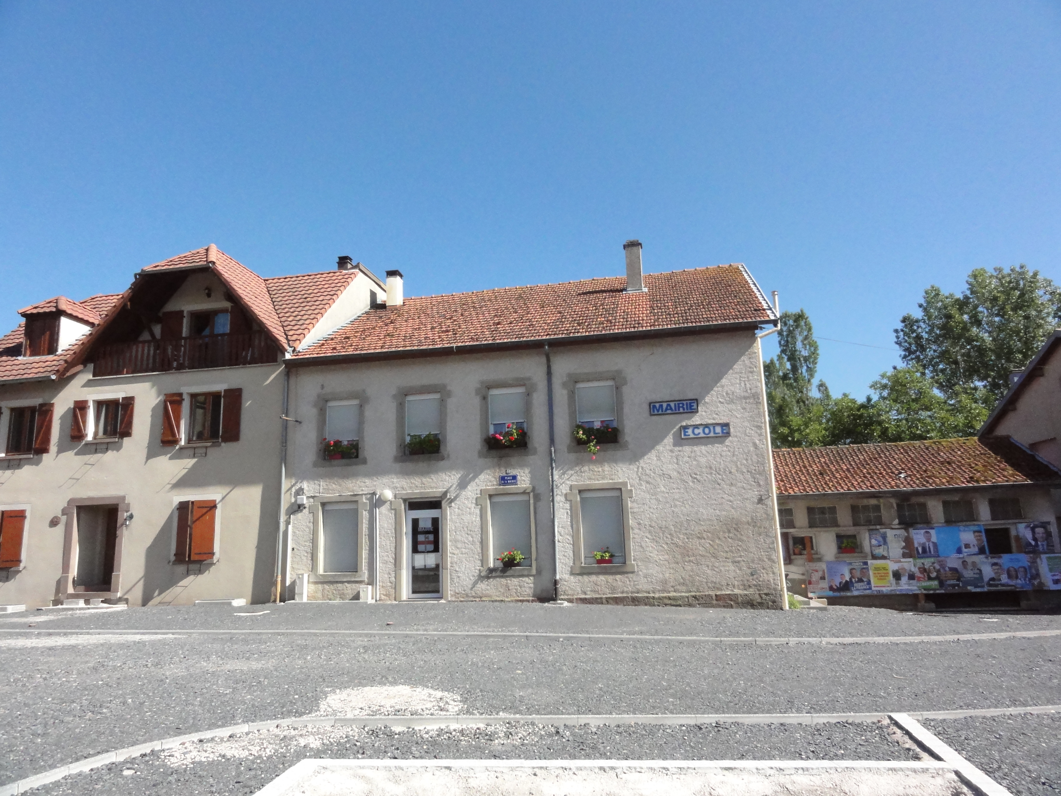 Domnom-lès-Dieuze (Moselle) mairie - école